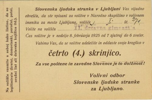 Volilni letak Slovenske ljudske stranke 1925